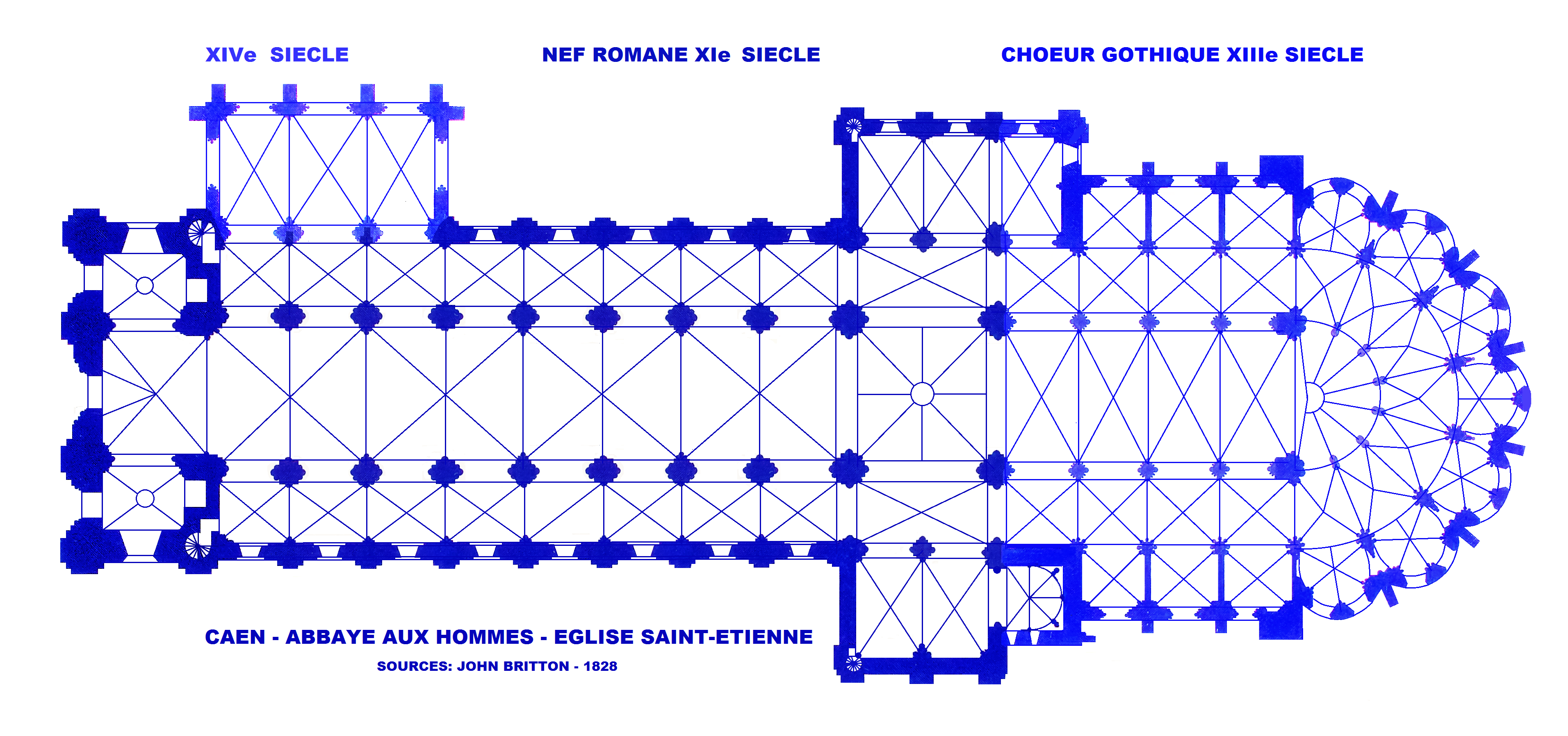 Caen, Abbaye aux Hommes, Eglise Saint-Etienne (image du domaine public modifiée, sources:John Britton,1771-1857)